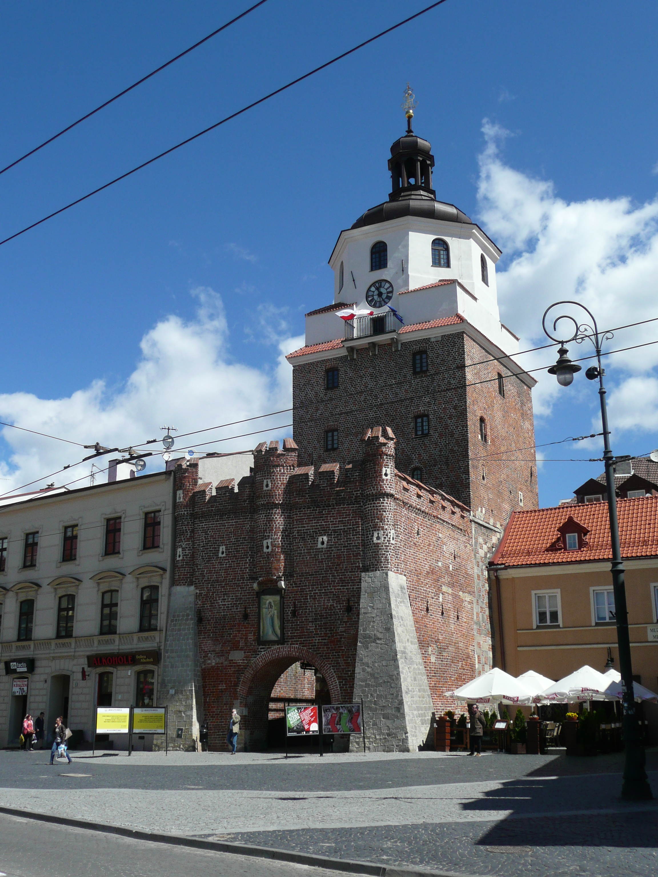 Krakow Gates in Lublin